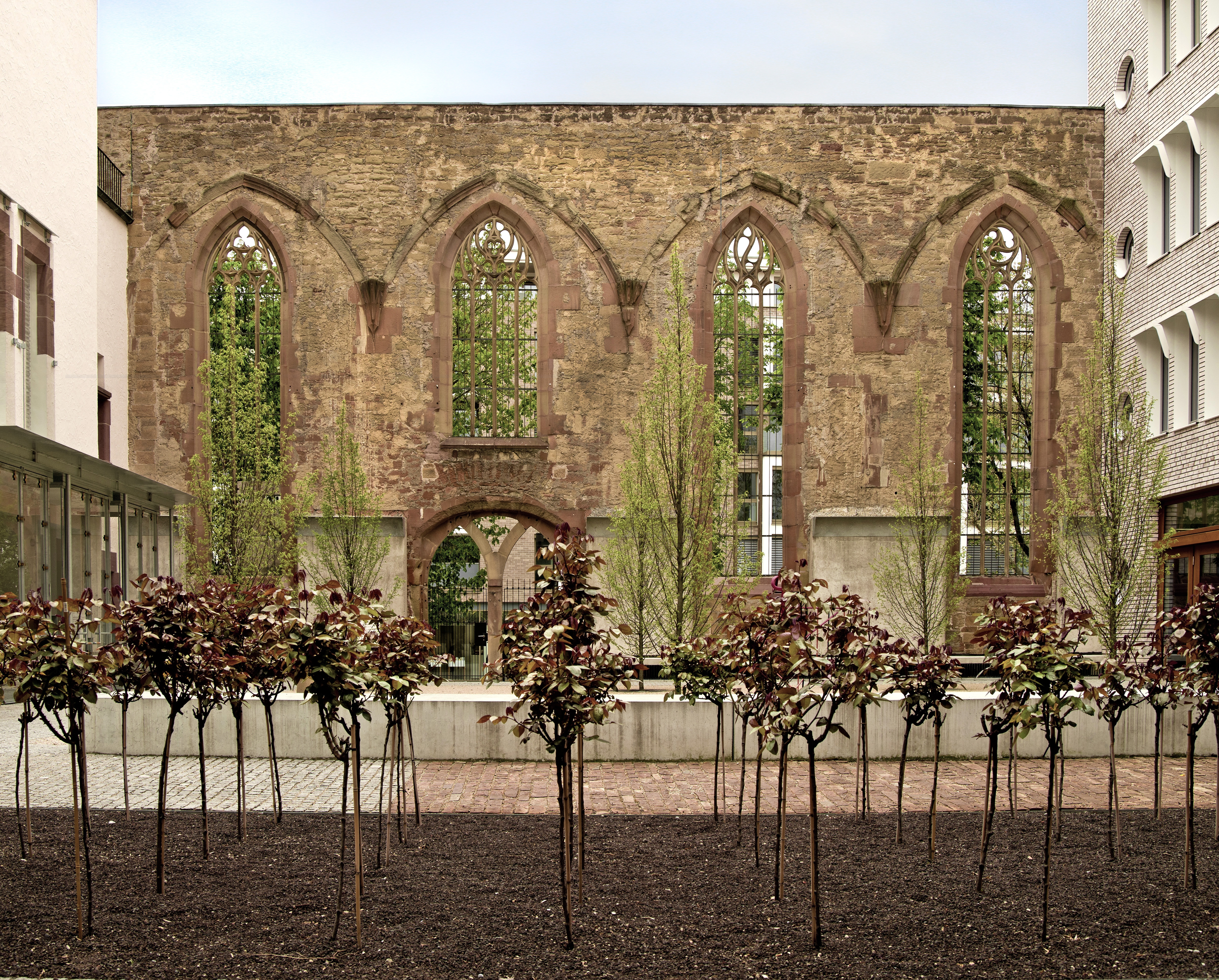 Rückseite der Südfassade der Hospitalkirche in Stuttgart, hinter dem linken Spitzbogenfenster befindet sich das Reformationsdenkmal. Links: Hospitalkirche, rechts: Hospitalhof, vorn: Rosenspalier des Hospitalhofs.